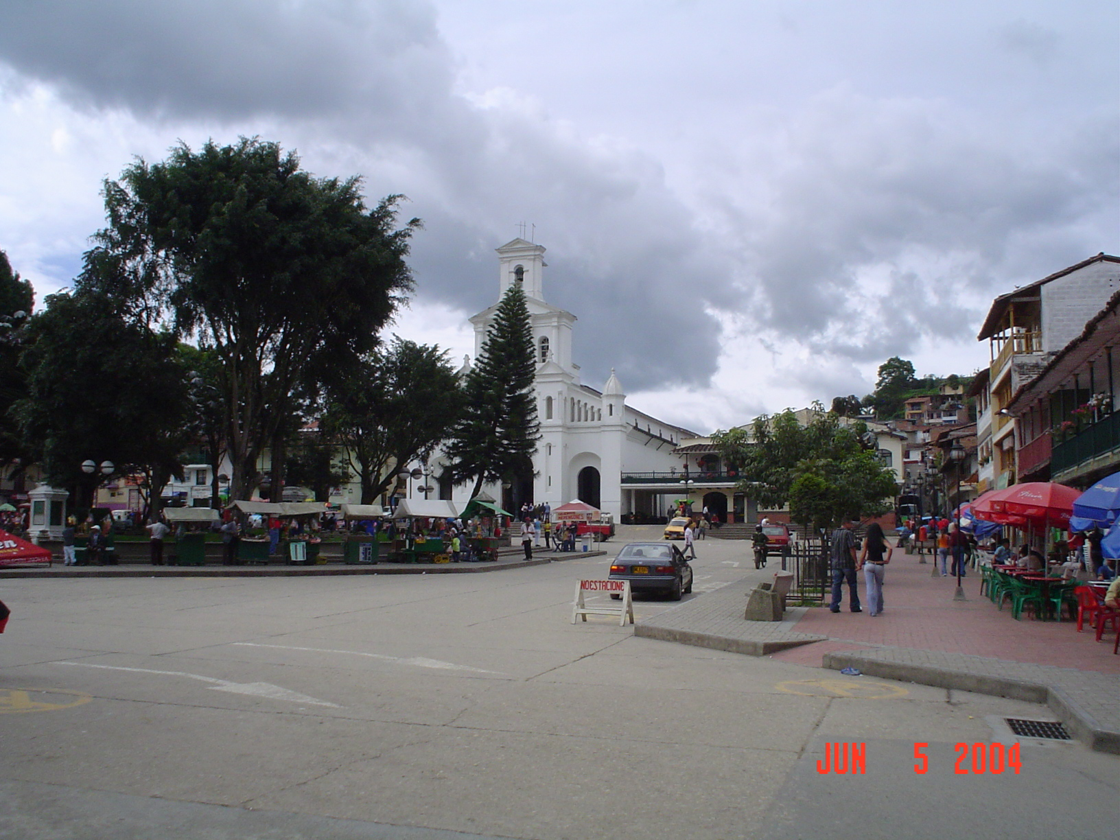 Municipio de Marnilla en el oriente Antioqueño